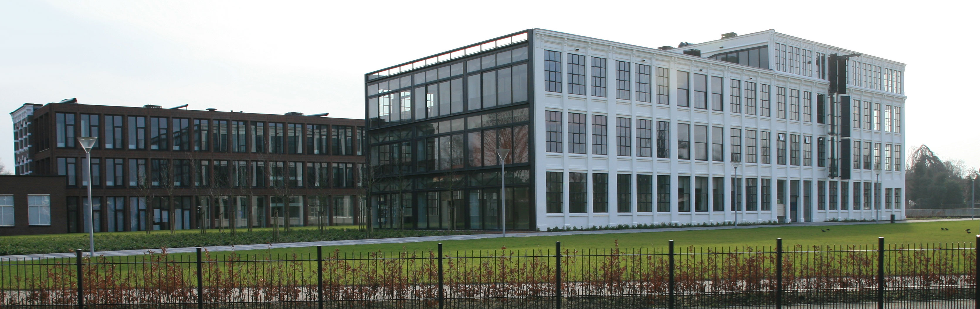 Tricotfabriek Winterswijk: Panorama aanzicht spoelerij